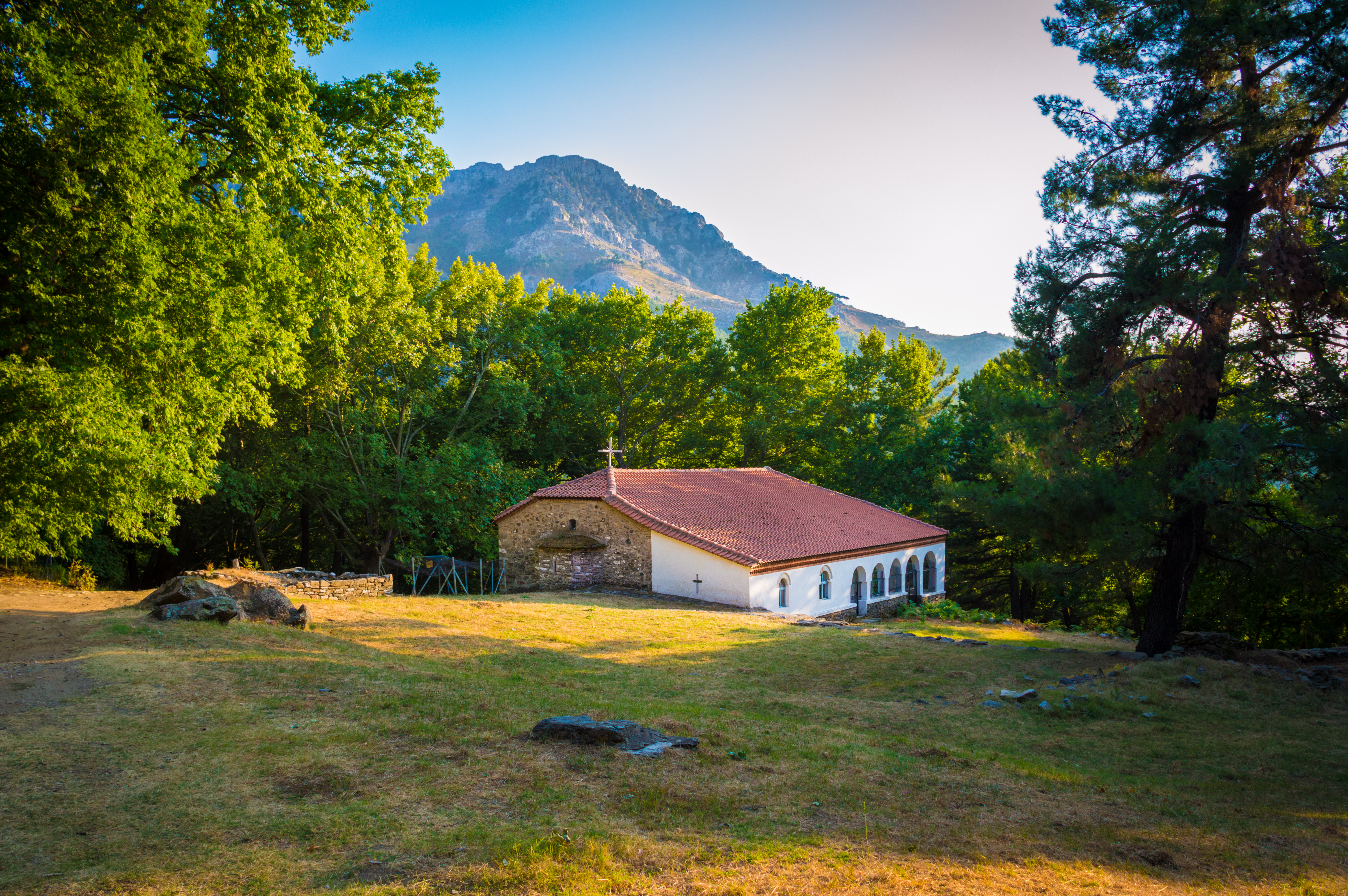 Ναός Αγίου Γεωργίου στον Μικρό Πρίνο«Ναός Αγίου Γεωργίου στον Μικρό Πρίνο»